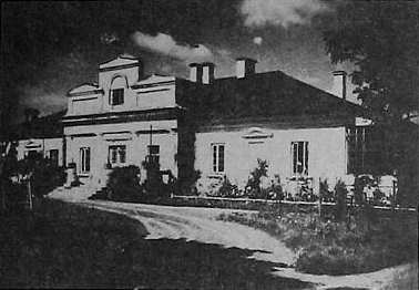 Беларуская (тарашкевіца): Горадня (Horadnia), Аўгустовак (Aŭgustovak). Карчма